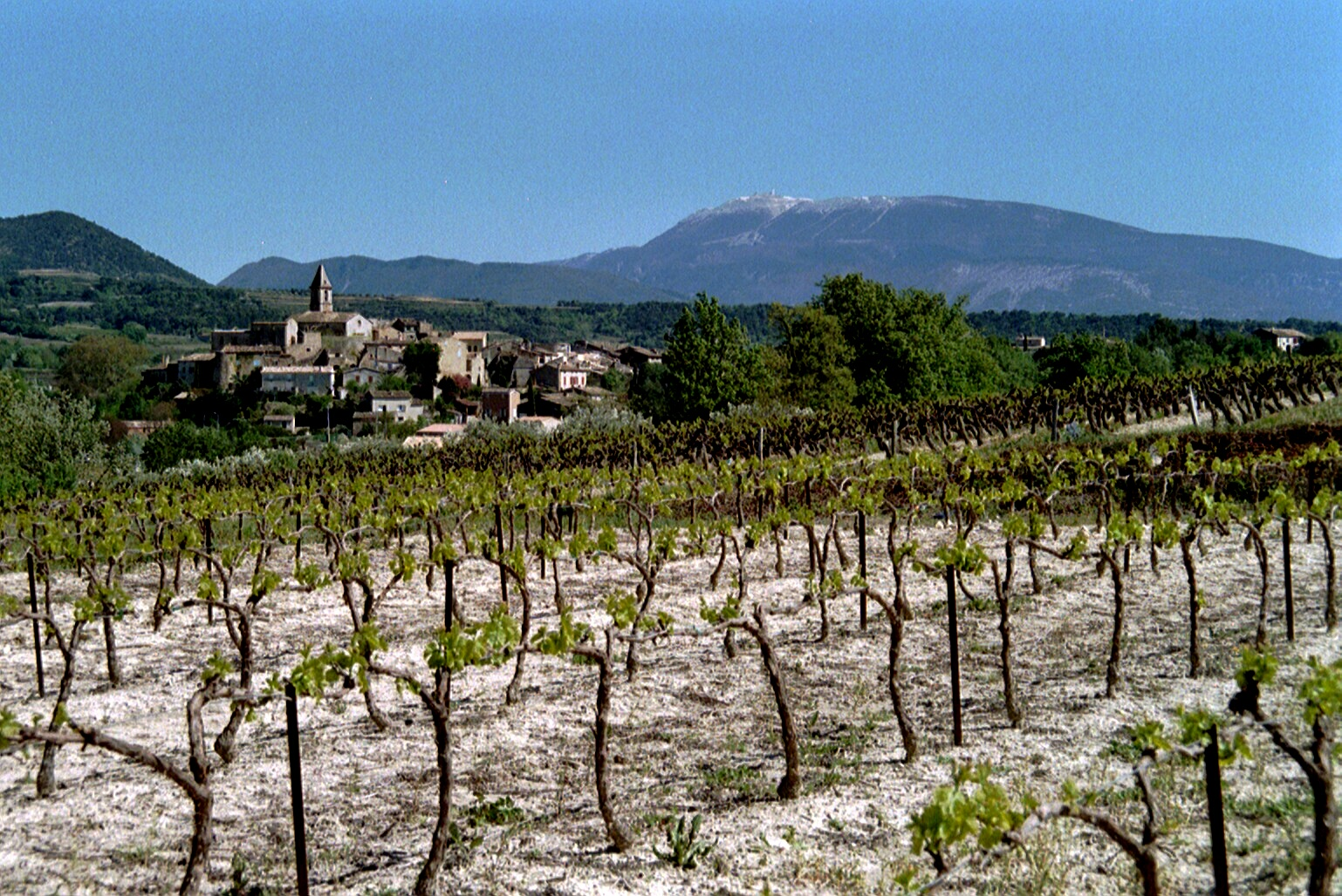 Image de Mirabel avec une vue sur le Mont Ventoux